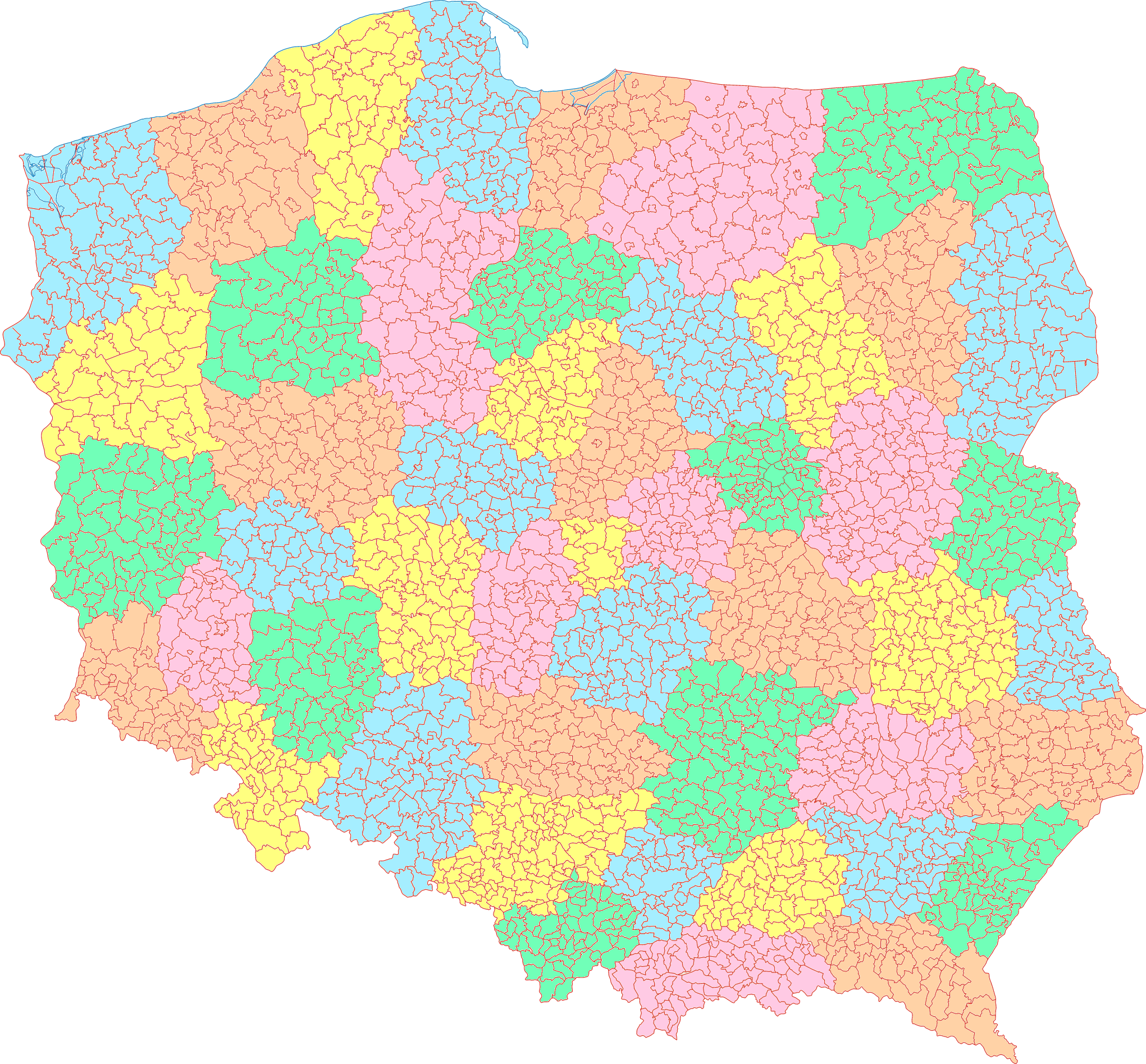 Podział administracyjny Polski w okresie 1 VI 1975 - 31 XII 1998 (stan na 31 XII 1998).